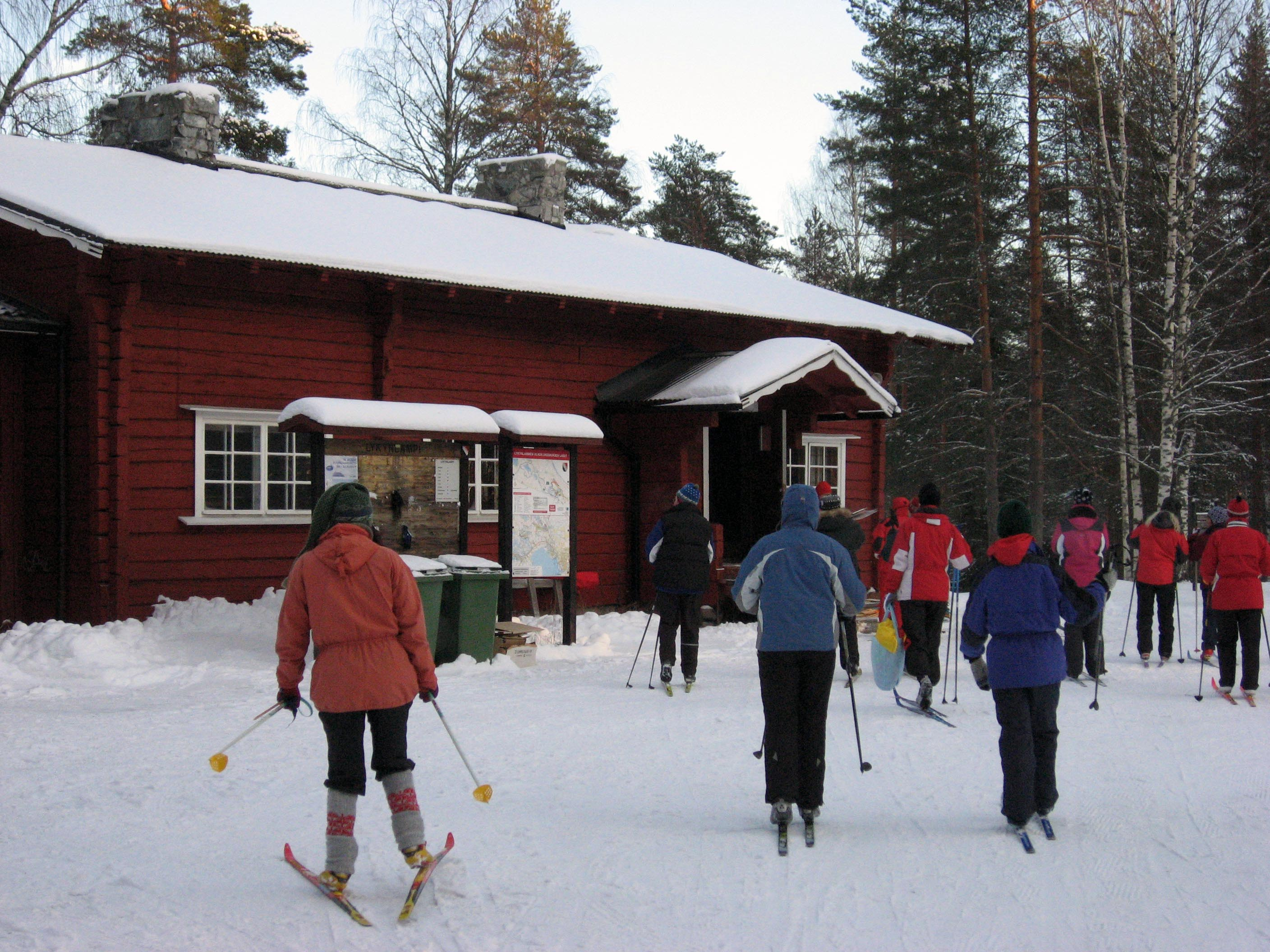 Lykymlampi skiing centre